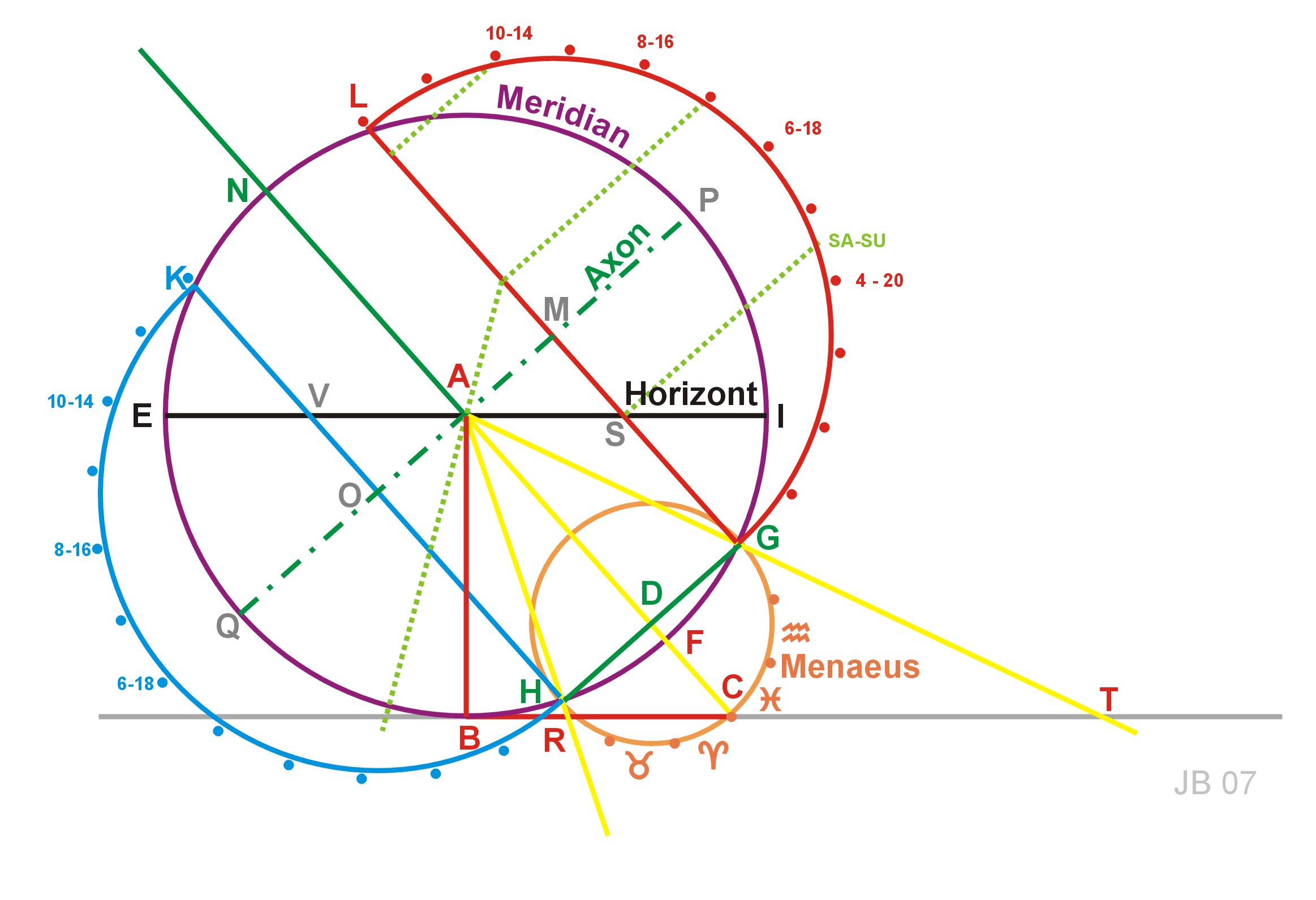 Zeichnung des Analemma von Vitruvius gemäß dessen Zehn Büchern über die Architektur (ca 22 v. Chr., mit Ergänzungen Zeichnung Joachim Bäcker